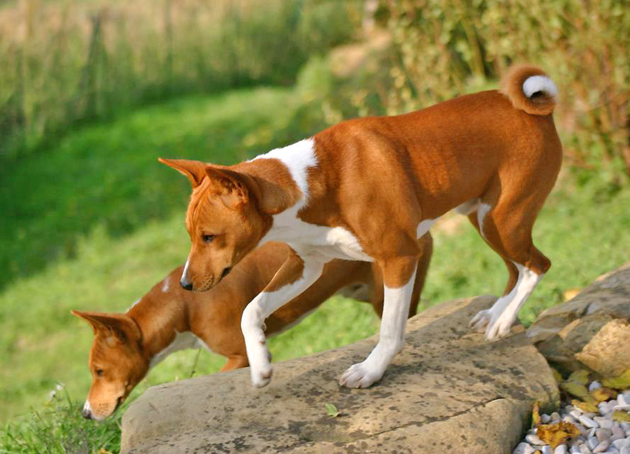 Basenji dogs